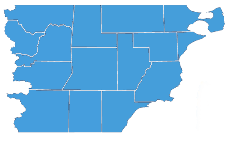 Ganador en la segunda vuelta de las elecciones presidenciales de 2015 de Argentina